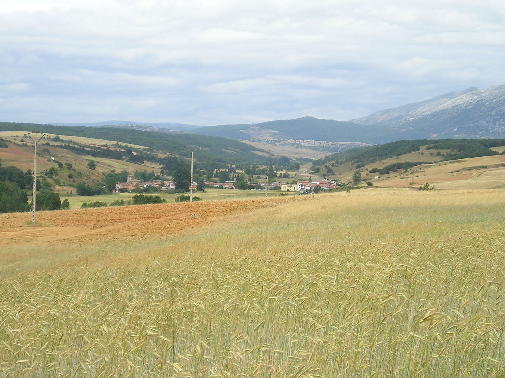 Respenda de la Peña (Palencia)